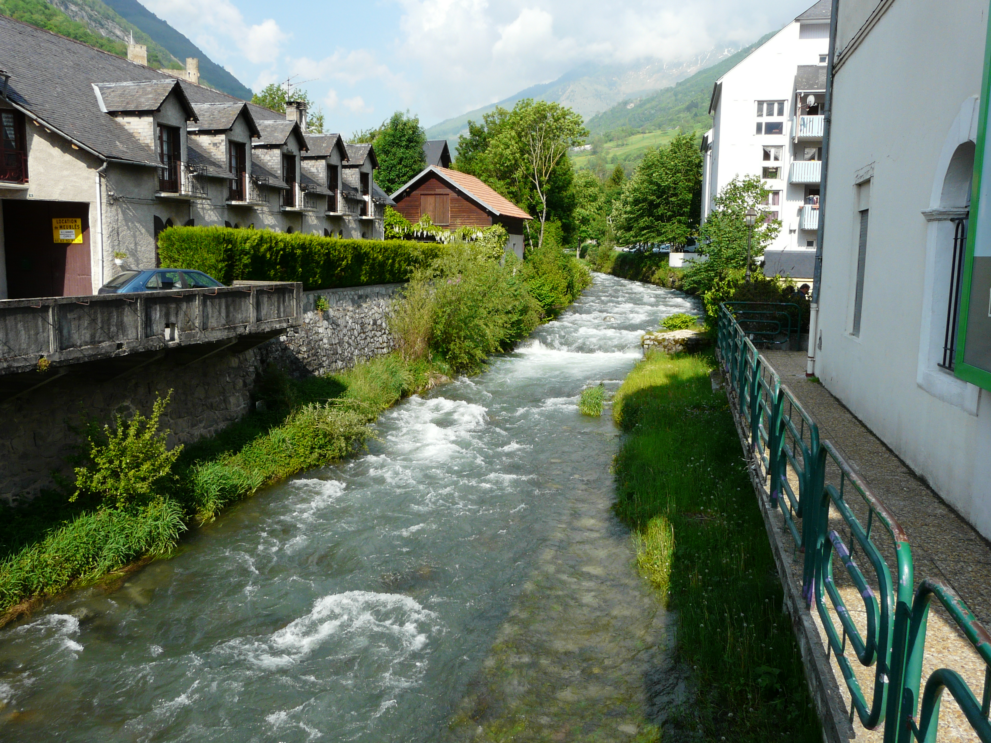 En amont du pont de la route départementale 921, le Bastan sert de limite entre les communes d'Esquièze-Sère (à gauche) et Luz-Saint-Sauveur (à droite), Hautes-Pyrénées, France.